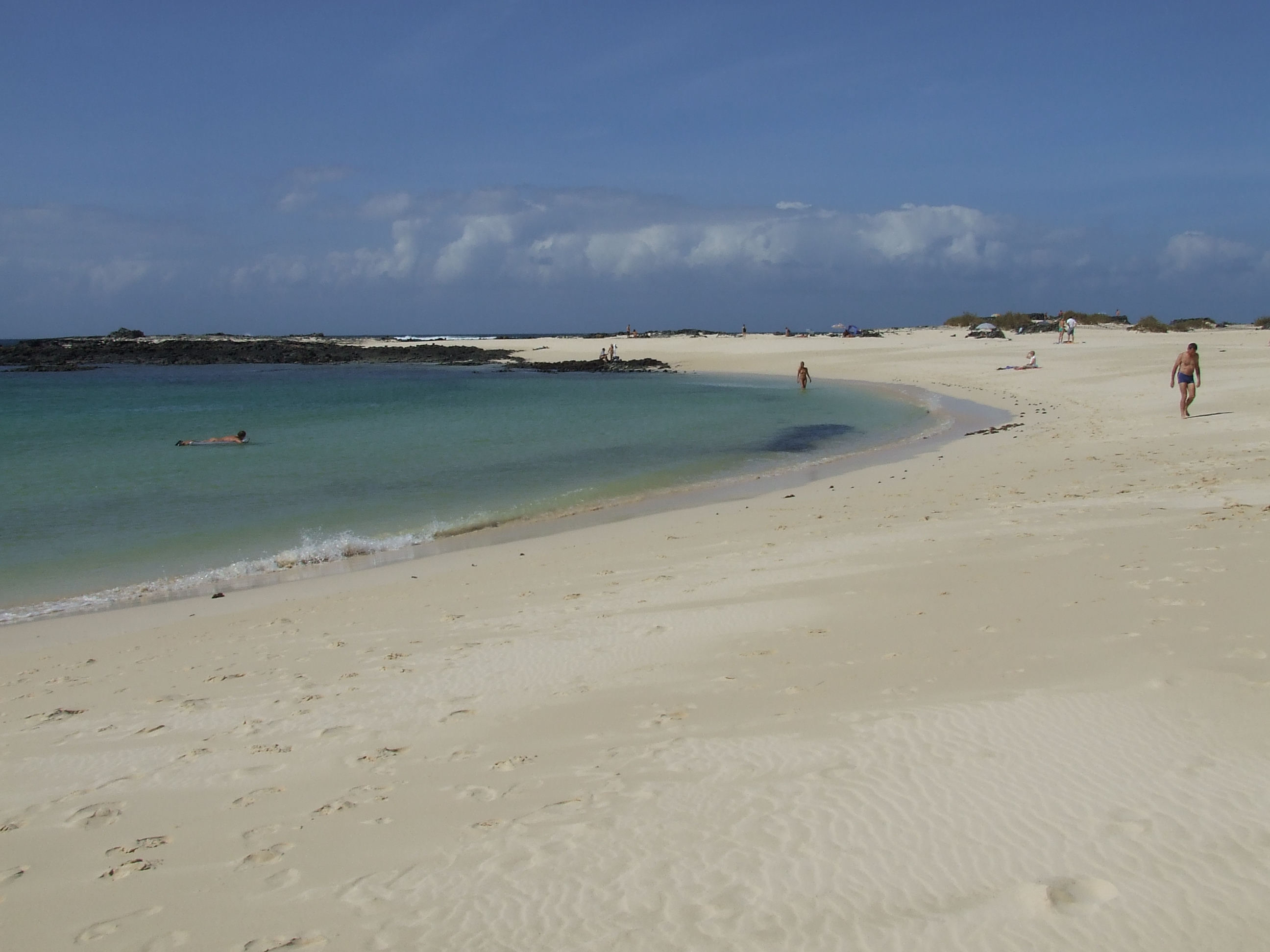 Playa El Cotillo